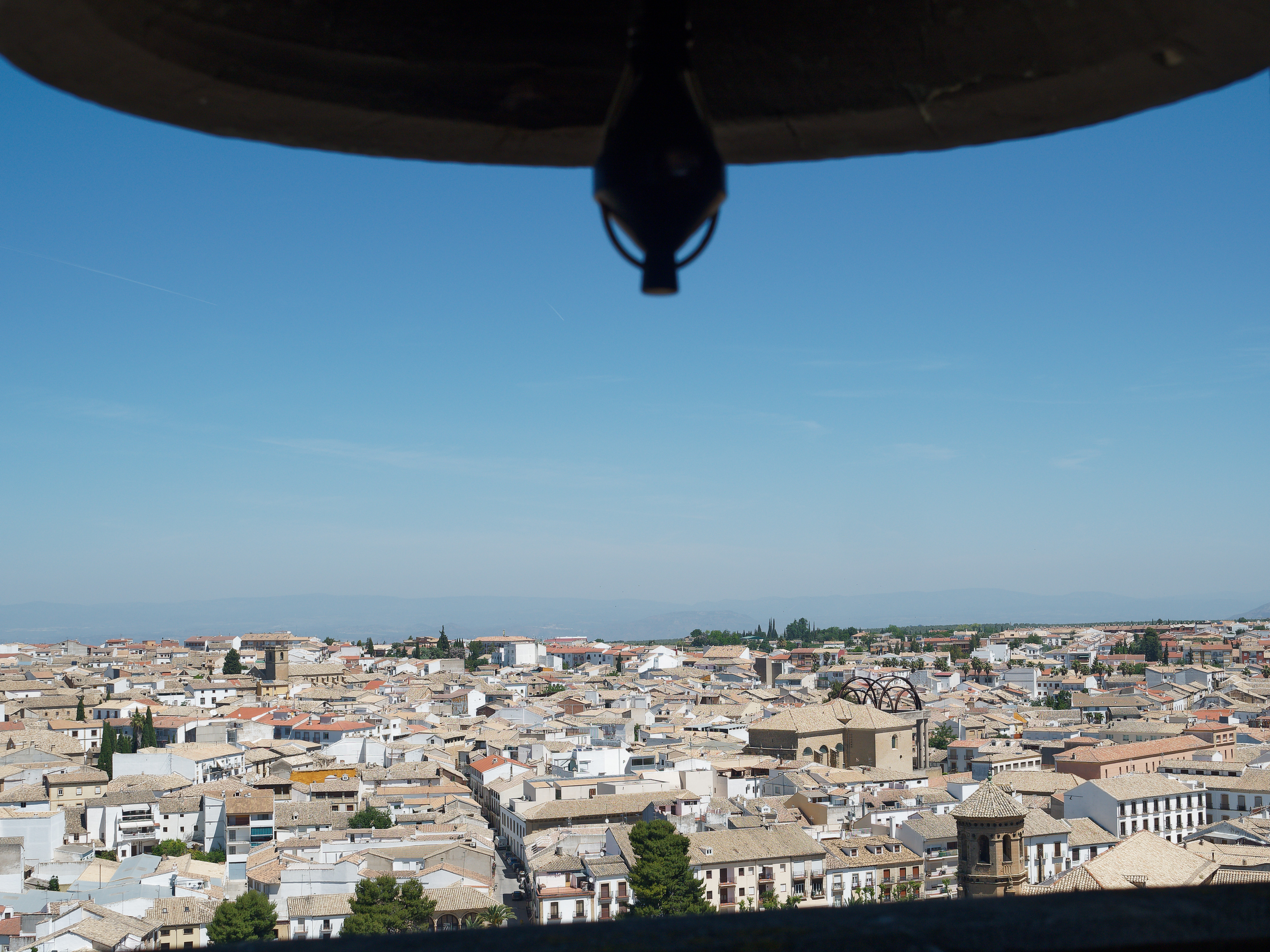 Vom Glockenturm der Kirche Catedral de la Natividad de Nuestra Señora in Baeza, Andalusien, Spanien, Blick nach Norden auf den Ort Baeza